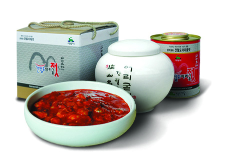 조선말: 서산의 어리굴젓